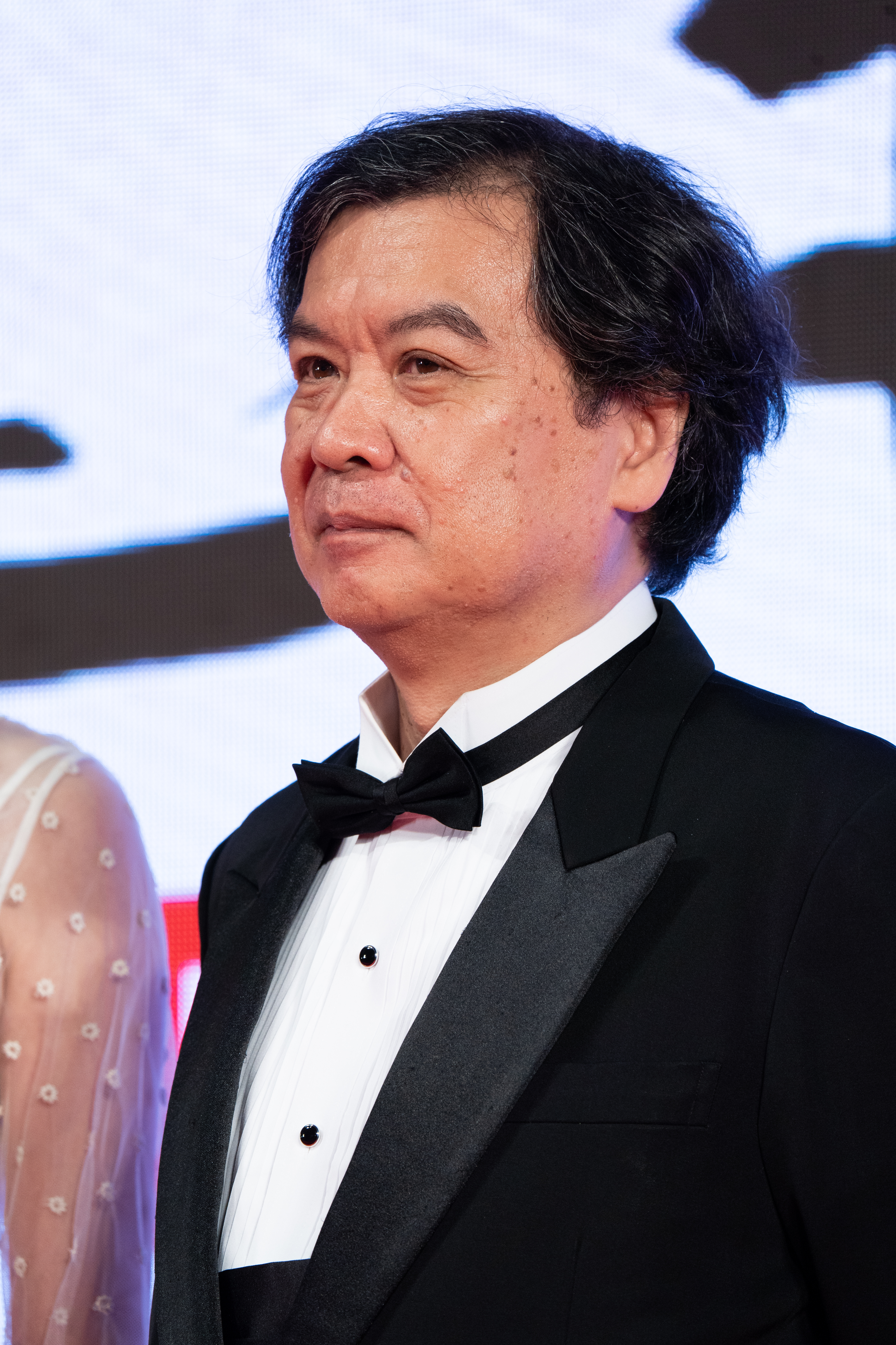 第32回 東京国際映画祭 オープニングセレモニー 片渕須直 (この世界の(さらにいくつもの)片隅に)